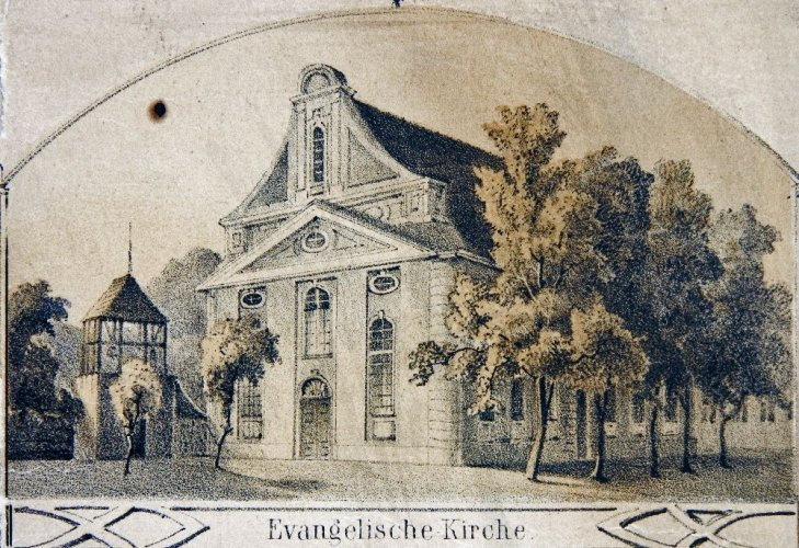 Stary kościół ewangelicki (1787 r.) przy ul. Podwale w Bydgoszczy, wyburzony ok. 1900 r. Obecnie na jego miejscu stoi hala targowa.